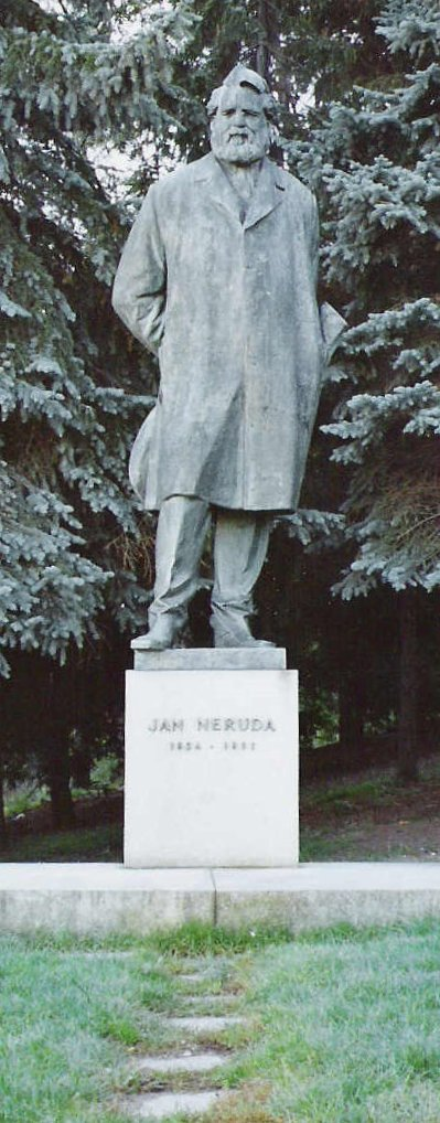 Denkmal für Jan Neruda auf der Prager Kleinseite